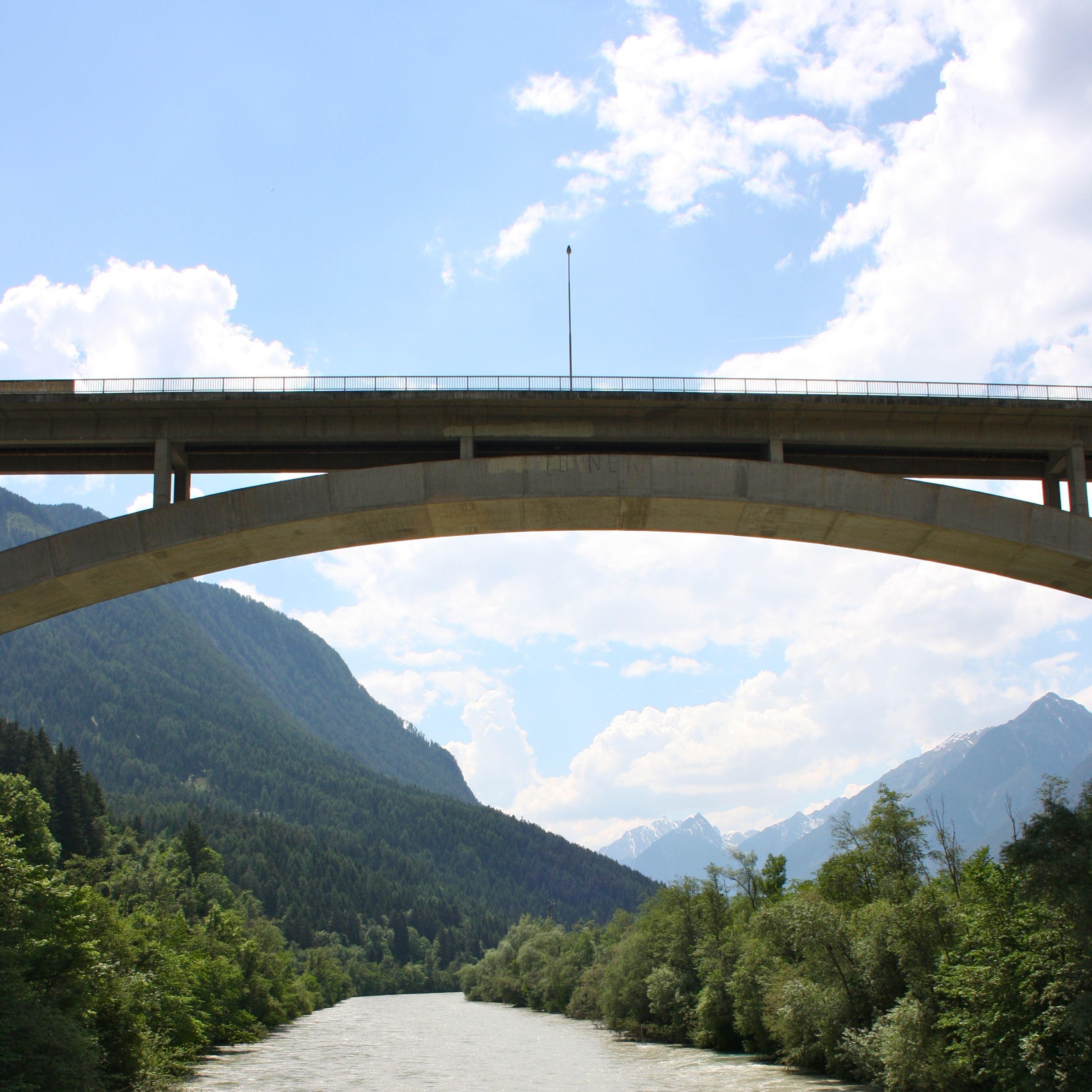 Innbrücke der Pitztalstraße (L16).